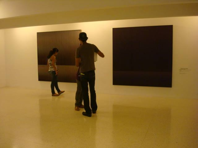 En la Sala 1 podemos observar obras de Jesus Soto y Cruz-Diez